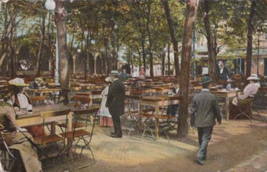 Berlin-Friedrichshain, ehemalige Brauerei Patzenhofer-Schultheiß, Biergarten anno 1909